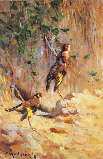 Madarász Gyula Madarak című festménye (1931)